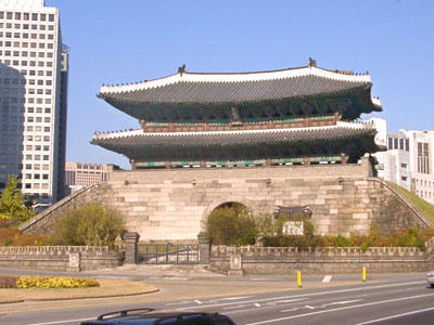 숭례문